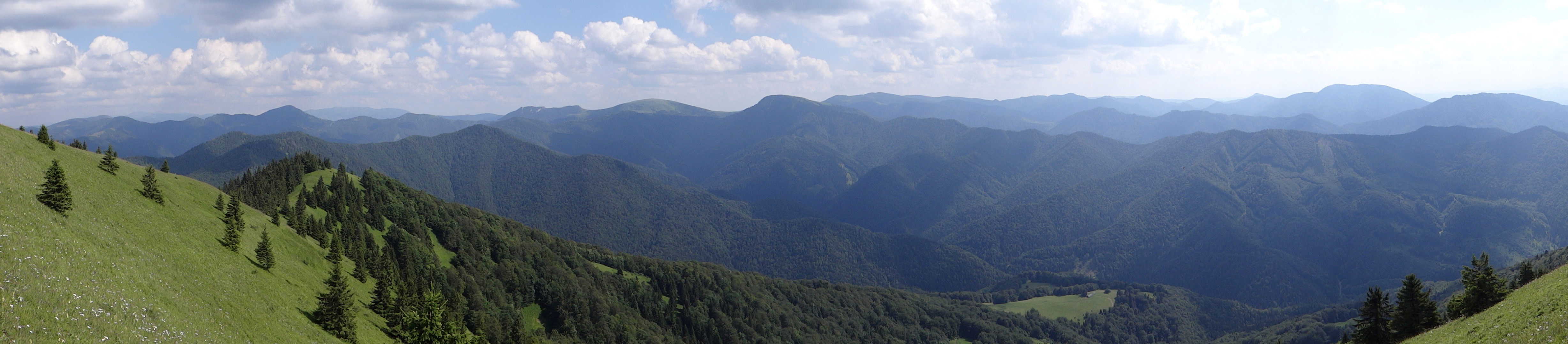 Lysec - panorama